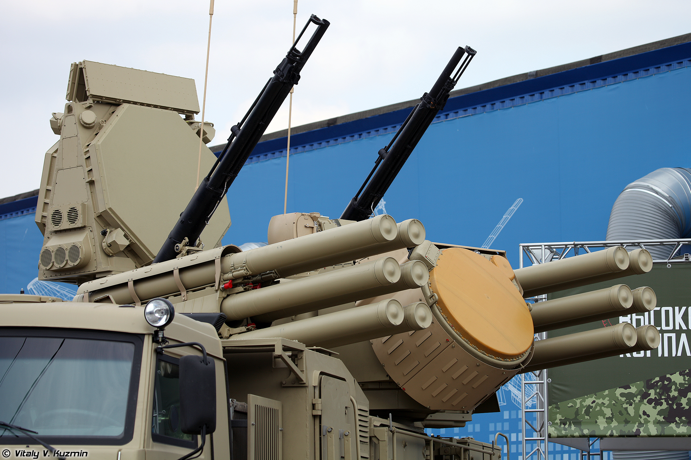 ЗРПК Панцирь-С1 (Pantsir-S1 TELAR)